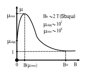 սաֆդսավ սադվսդավսդ